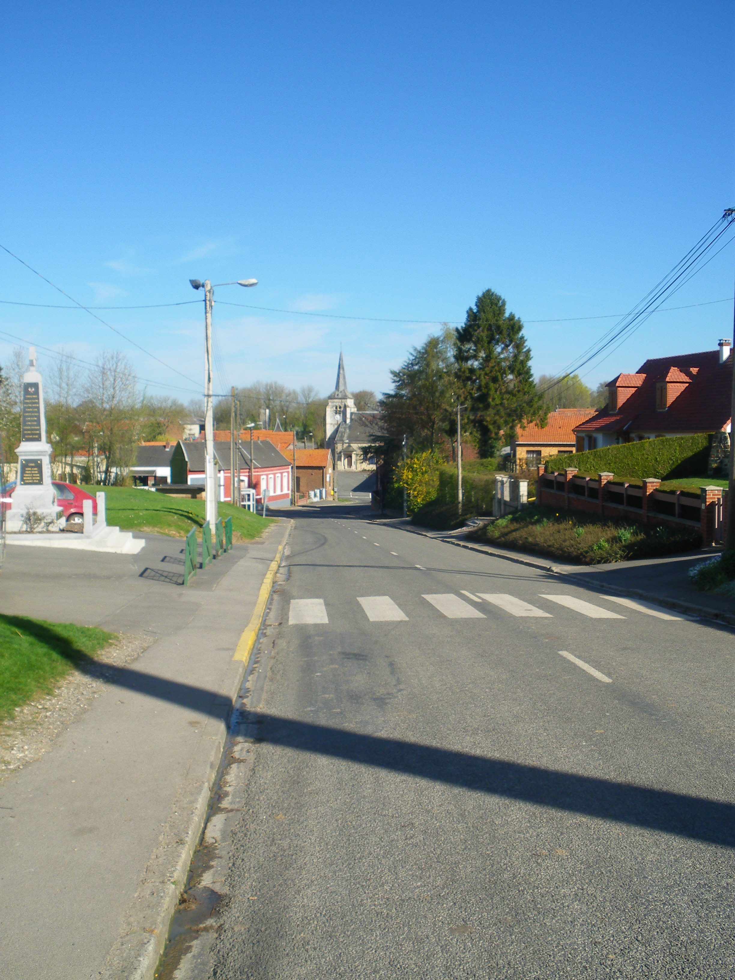 Vue de Sailly-au-Bois.